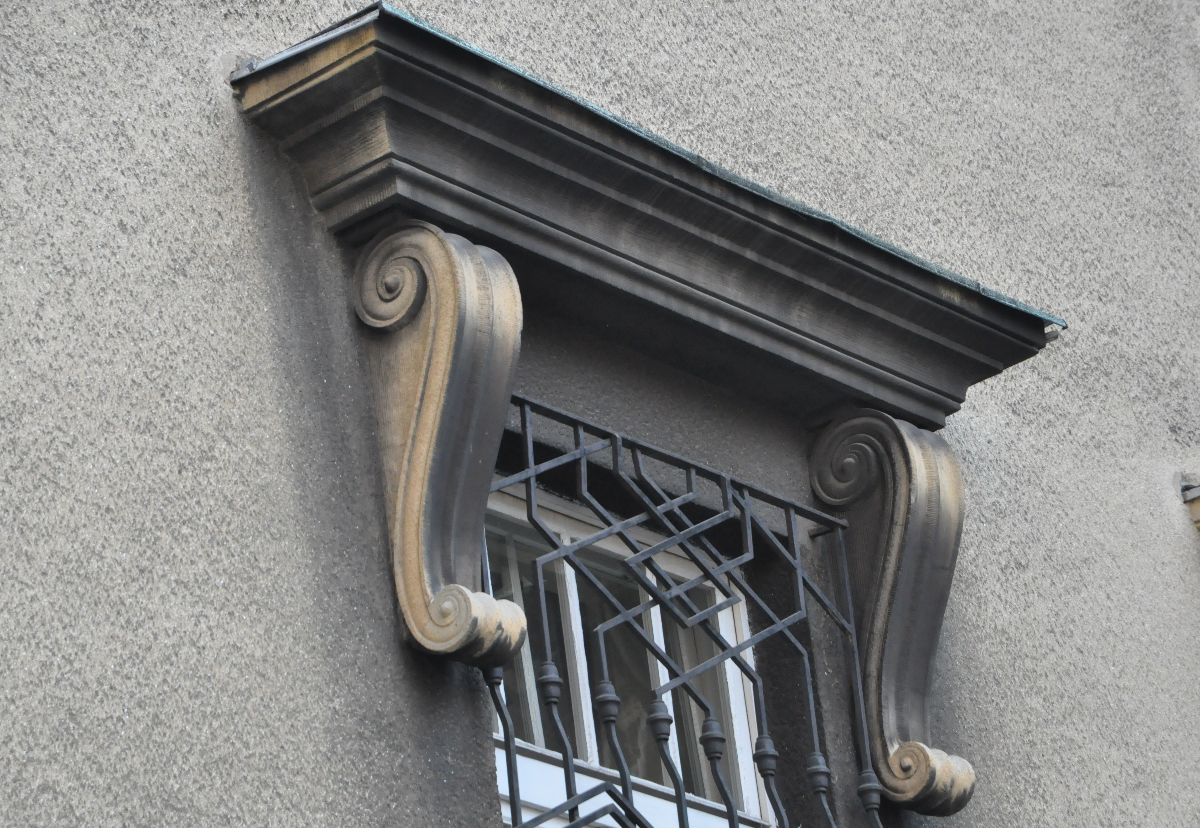 gzyms nadokienny - detal budynku Kurii Metropolitalnej w Katowicach